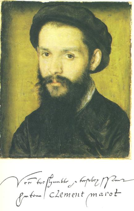 Clément Marot. Al jaren oud, dus vast PD